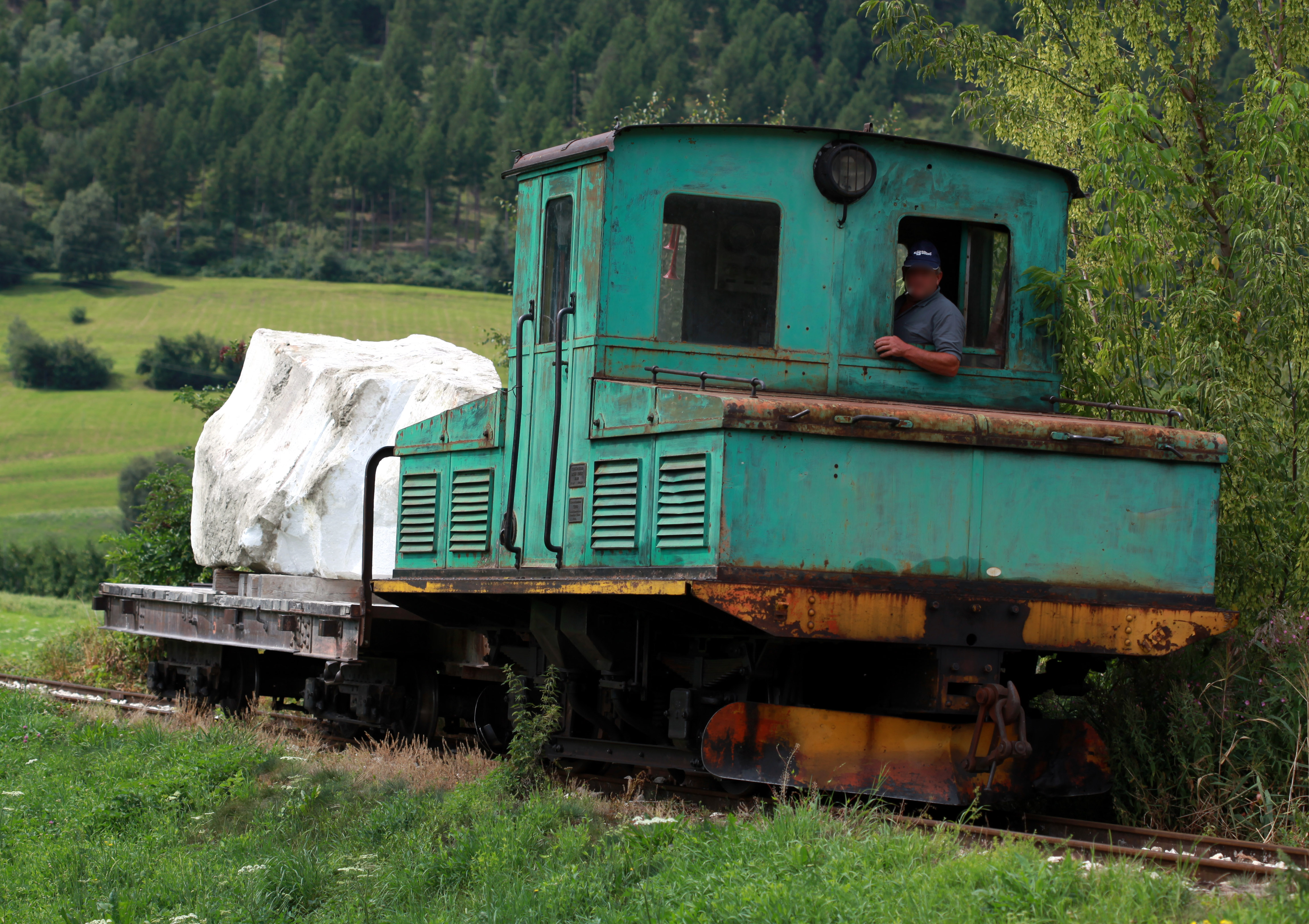 Die Laaser Marmorbahn mit Marmorblock auf dem Weg zum Werksgelände im Tal.